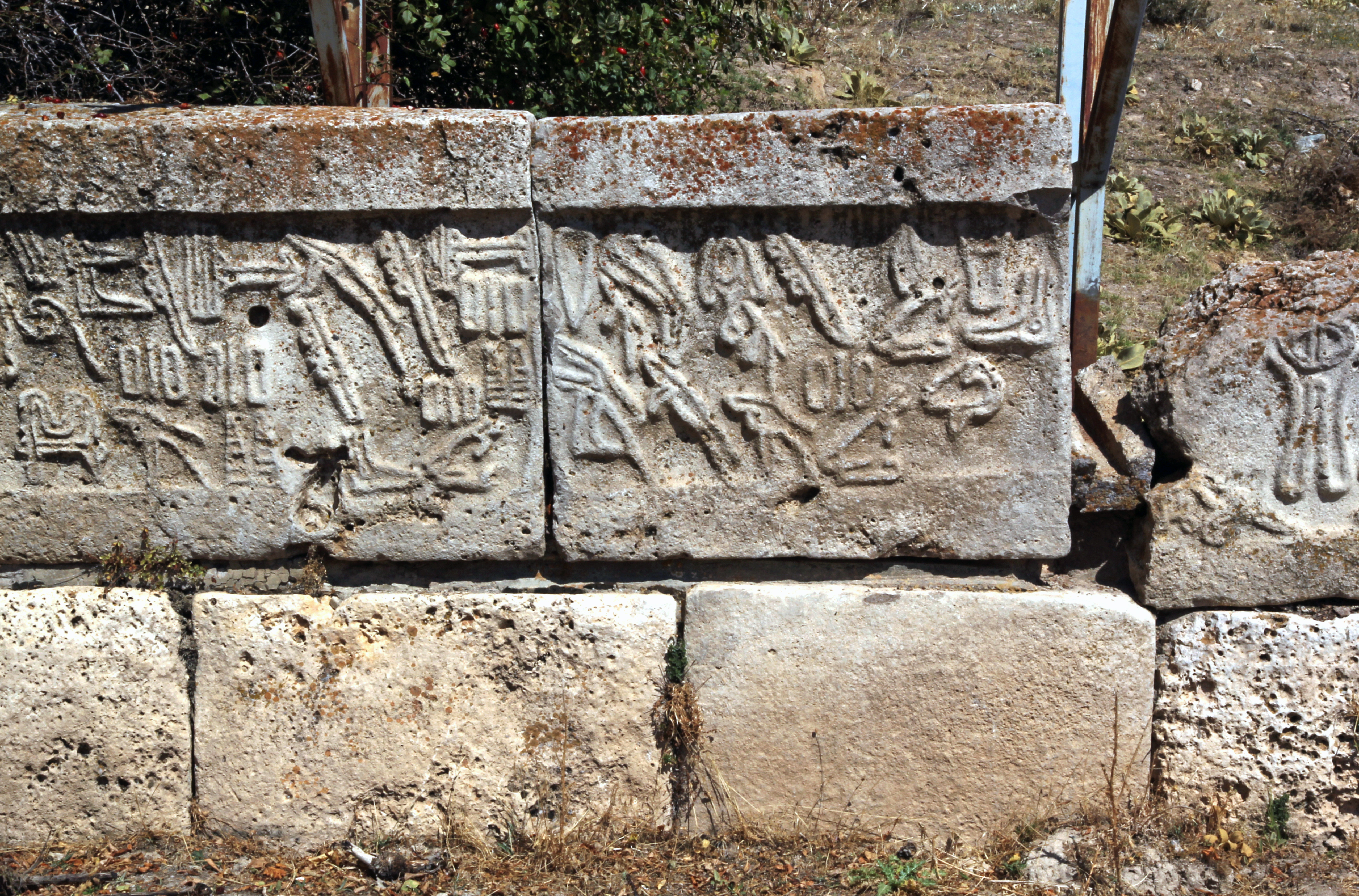 Yalburt, hethitisches Wasserbecken mit einem Feldzugsbericht Tudhalijas IV., nördlich Ilgın in der türkischen Provinz Konya. Nordseite Block 15